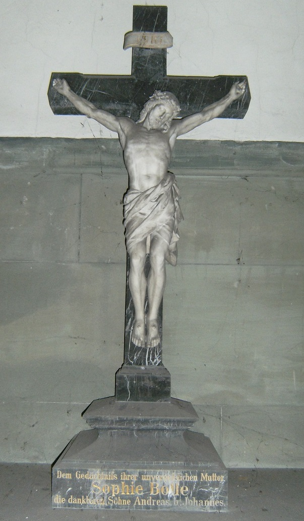 Kreuz mit Marmorcorpus von Bildhauer Friedrich Pfannschmidt. Im Mausoelum Fam. Carl Bolle, Alter St.-Matthäus-Kirchhof. Gesamt-Höhe ca. 80 cm. Foto: L. Wekenborg